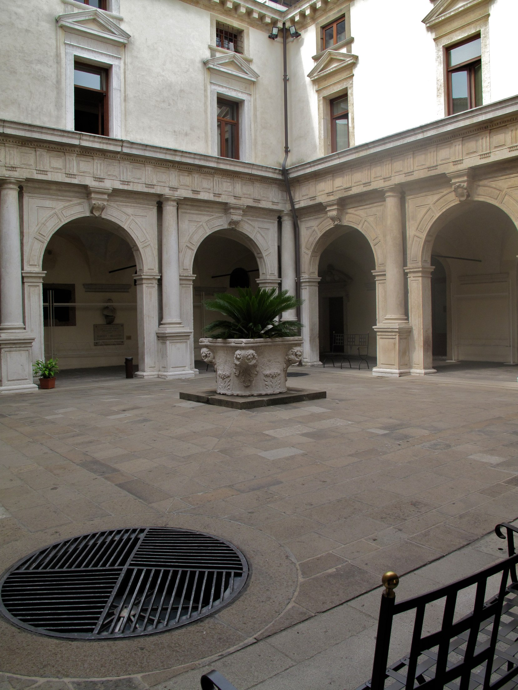 Padova juil 09 118